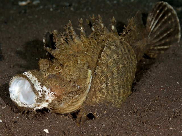 オニオコゼ Inimicus japonicus